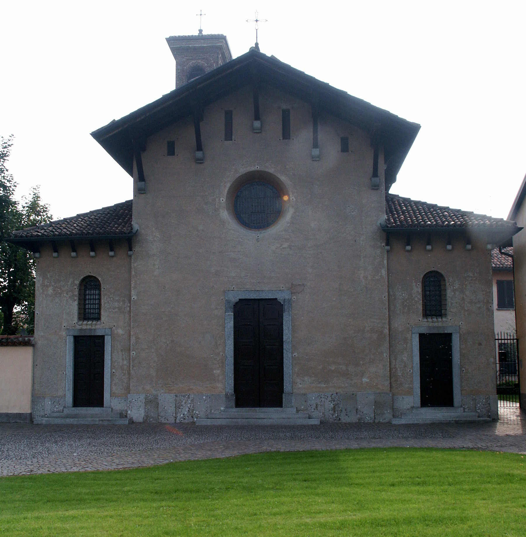 Concorezzo, Chiesa di Sant'Eugenio (VIII secolo) Source: Photo by Frieda